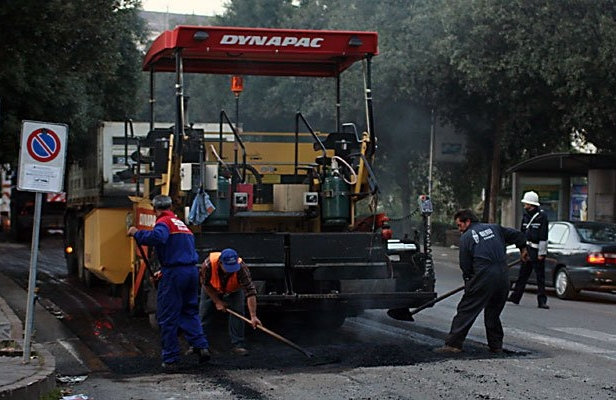 Bitumazione stradale, via Roma, Cosenza